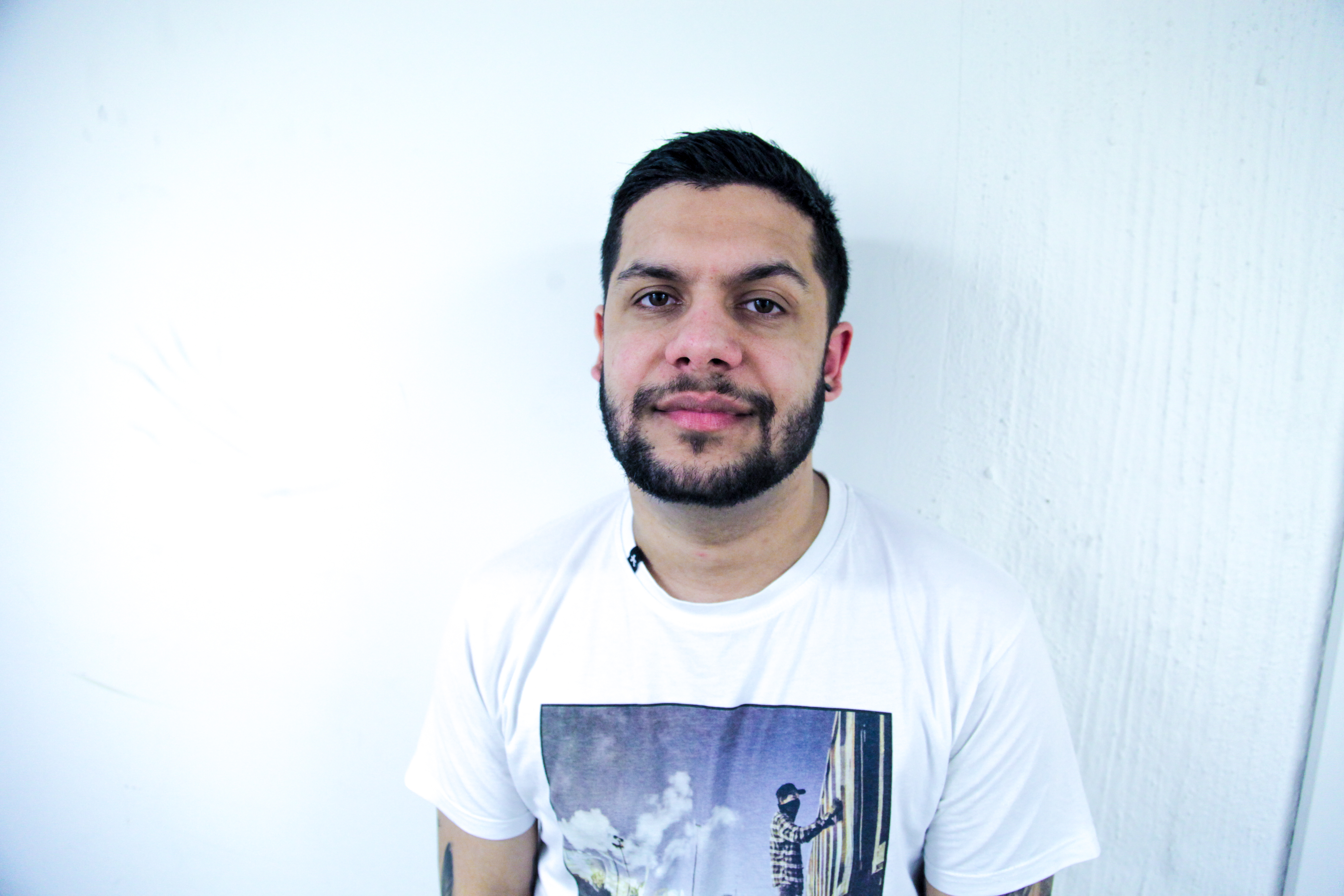 Meta Four Press 2014